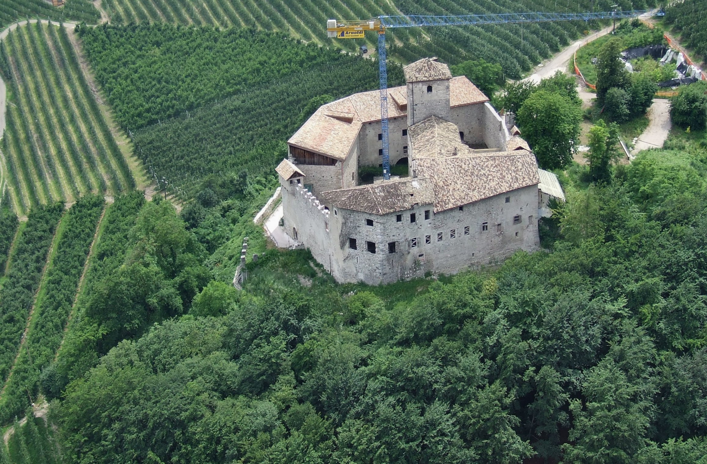 veduta aerea castel Belasi -Lover di Campodenno-valle di Non -Trentino-(Italia)